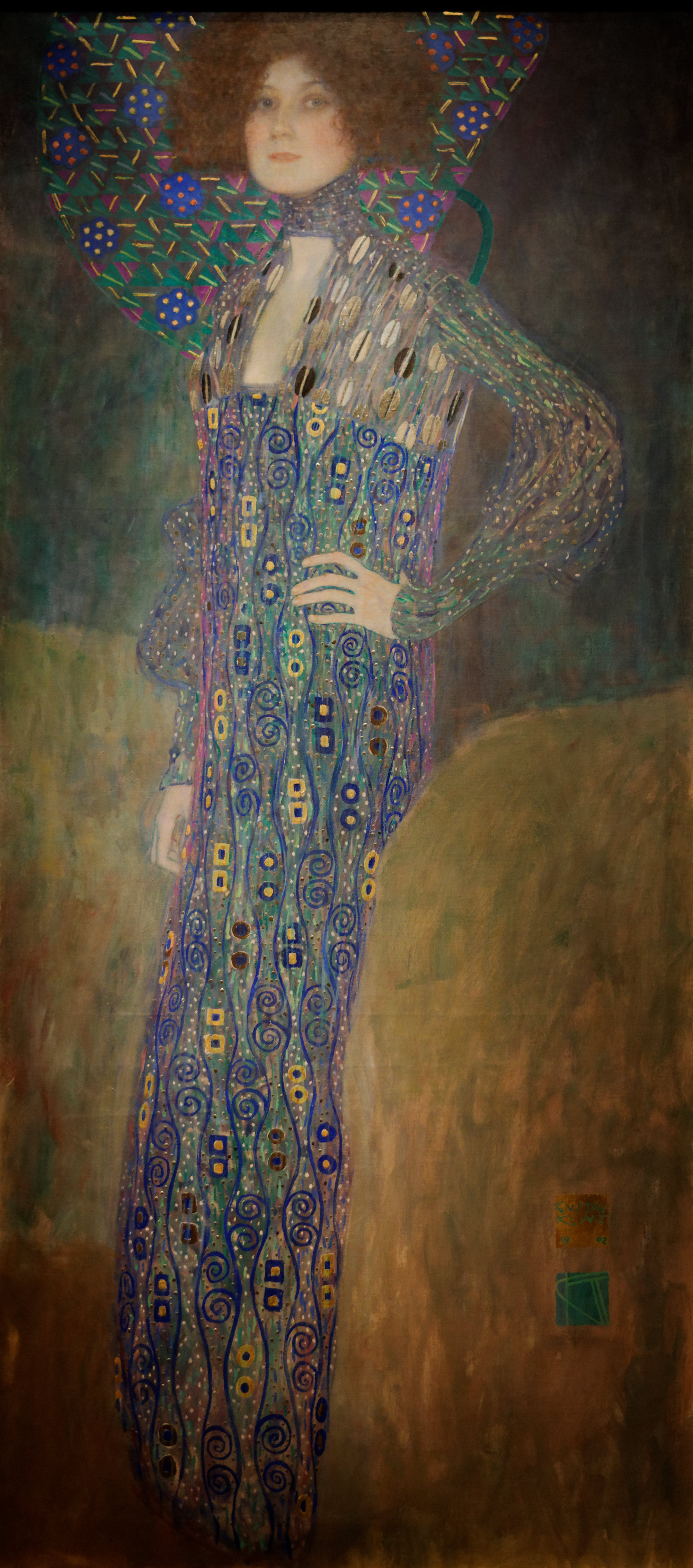 detail